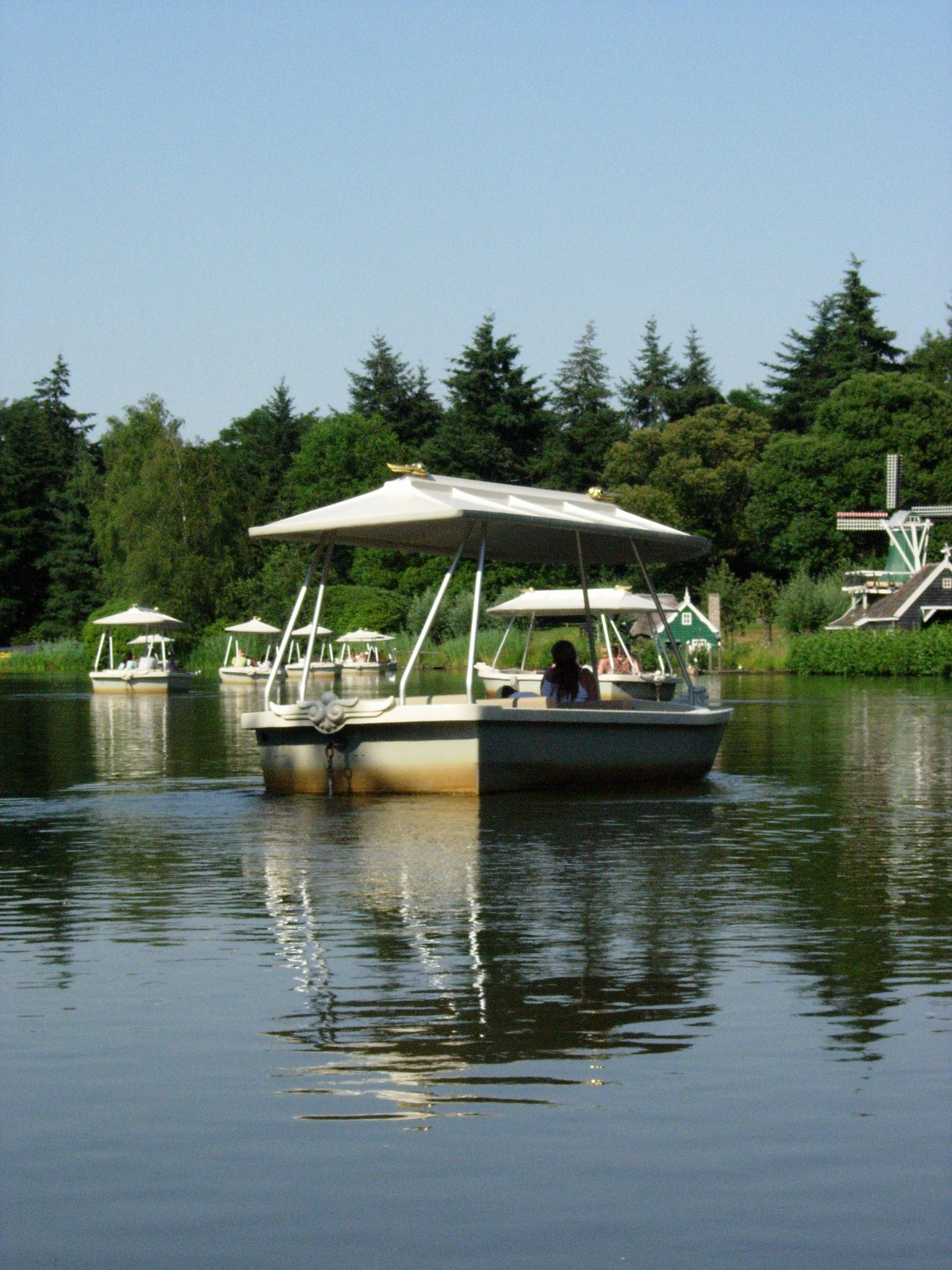 Gondoletta